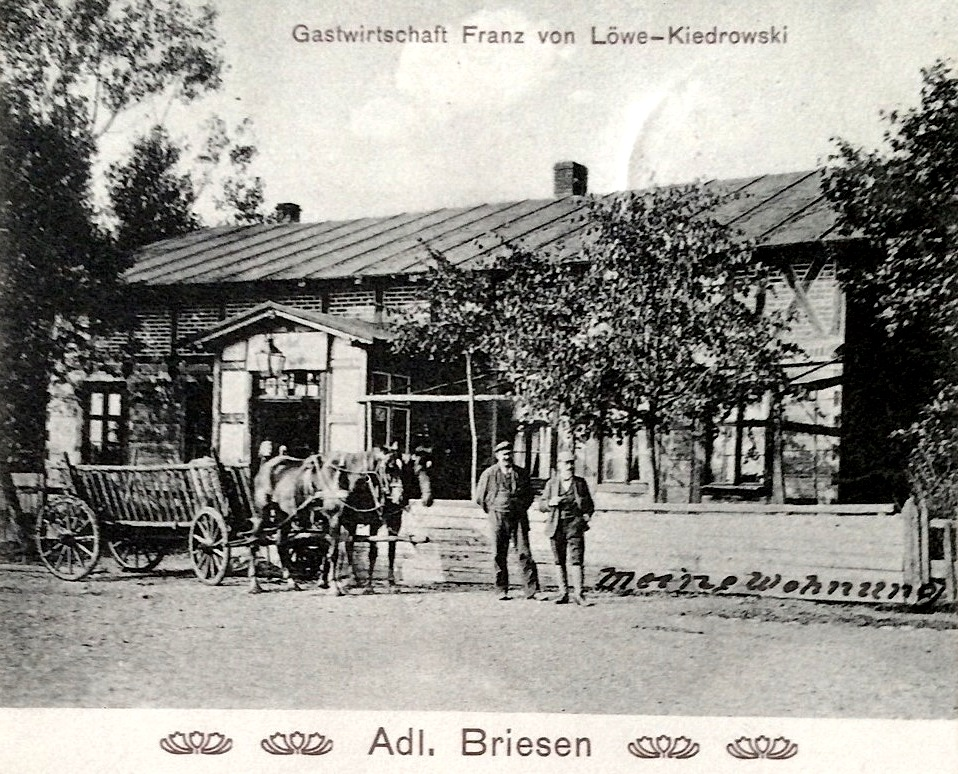 Gastwirtschaft Franz v. Löwe Kiedrowski, Adlig Briesen